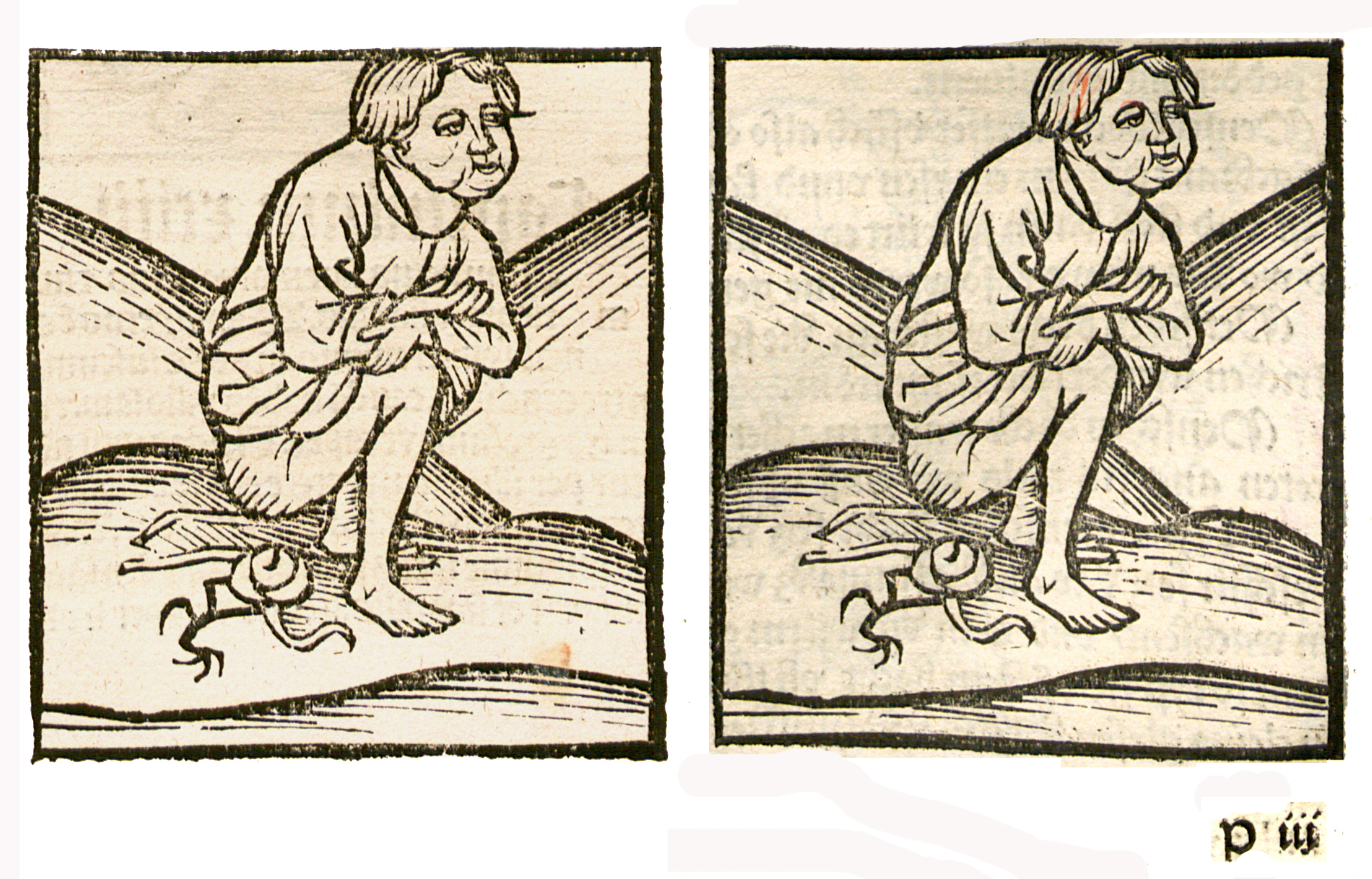 Abbildung von: Menschen Bocht (Kot)